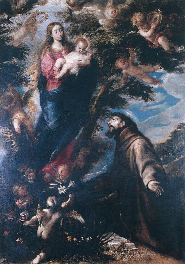 La obra representa a San Francisco de Asís, el fundador de la Orden de los franciscanos, teniendo una visión de la Virgen María.